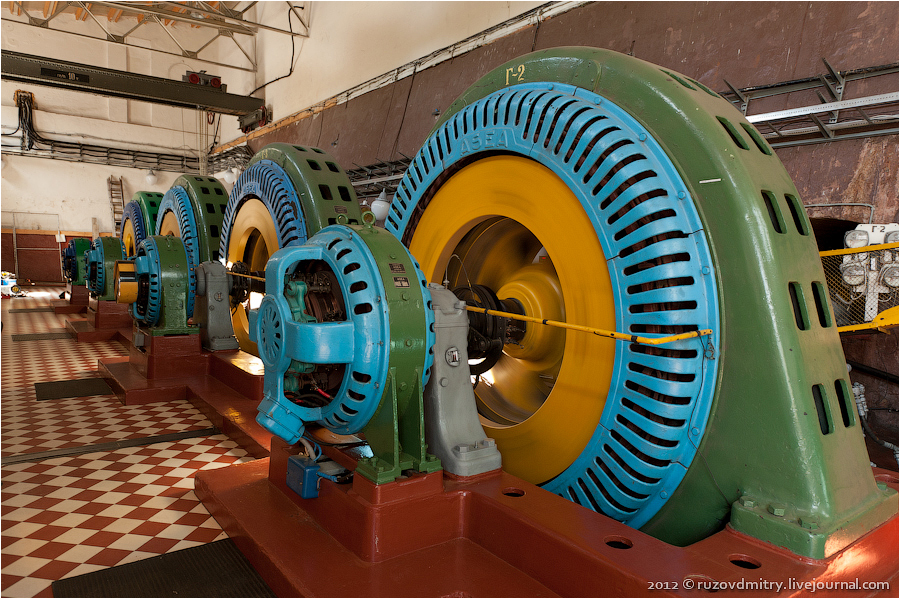 4 агрегата Хямекоски ГЭС-21, вдали видны остатки пятого агрегата, ликвидированного при модернизации